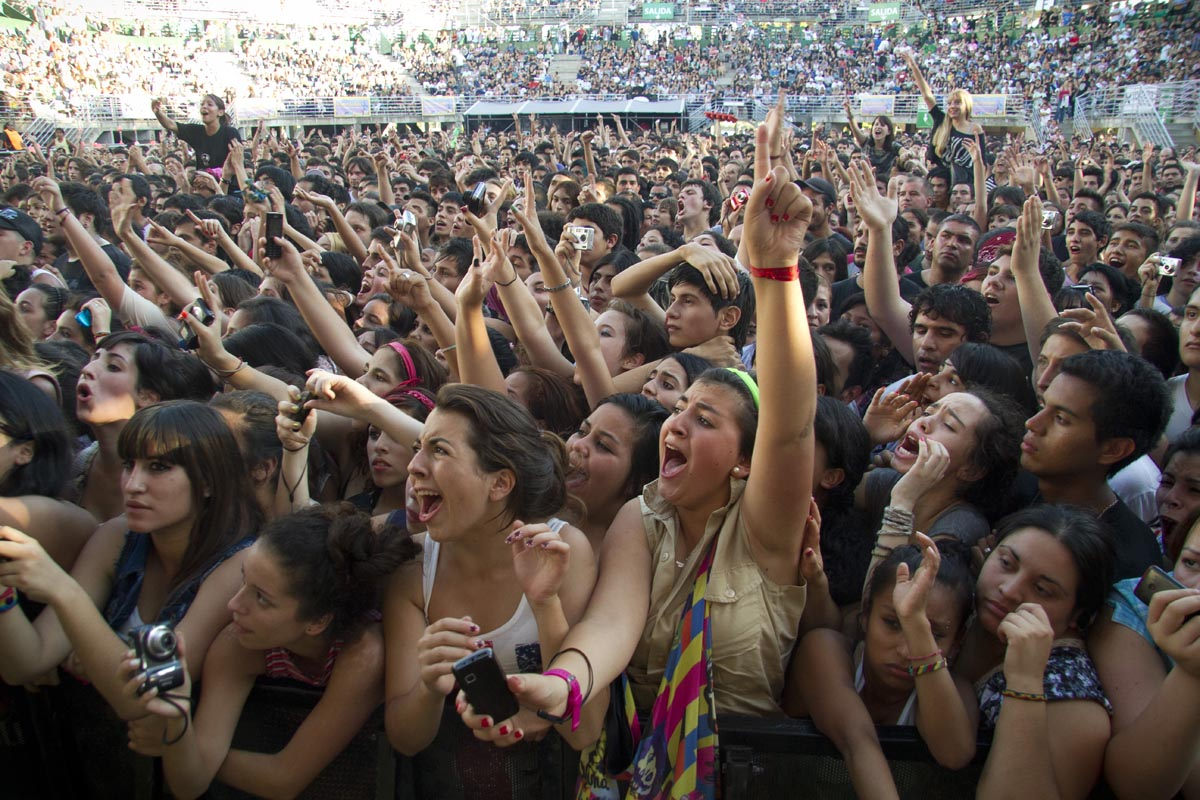 Tres bandas argentinas por fecha levantan la temperatura del verano porteño. Participaron referentes del rock local como Catupecu Machu, Las Pelotas y Kapanga entre otros y bandas emergentes de la escena local. ( Foto: Estrella Herrera)